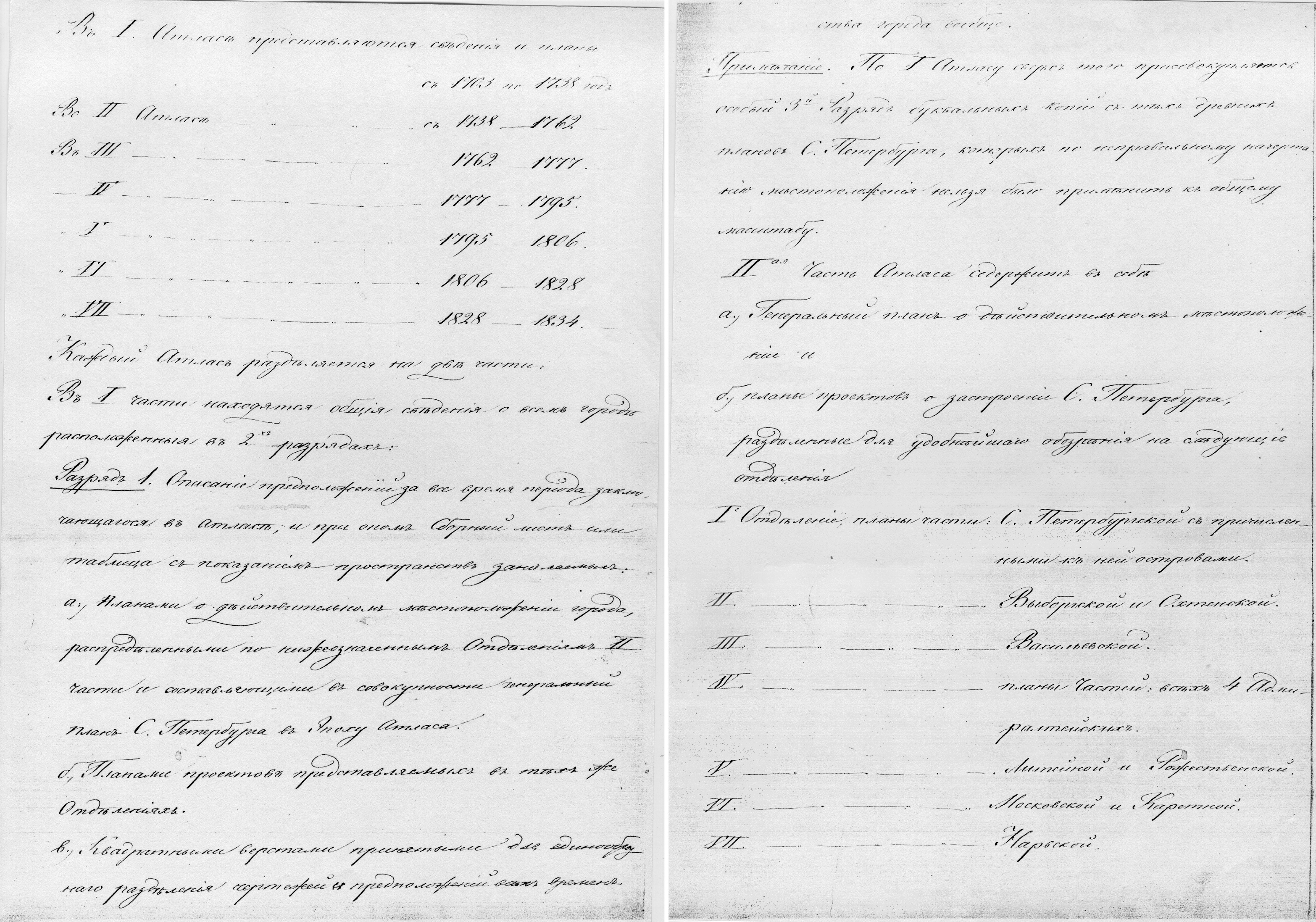 Копия листа из собрания А. Л. Майера